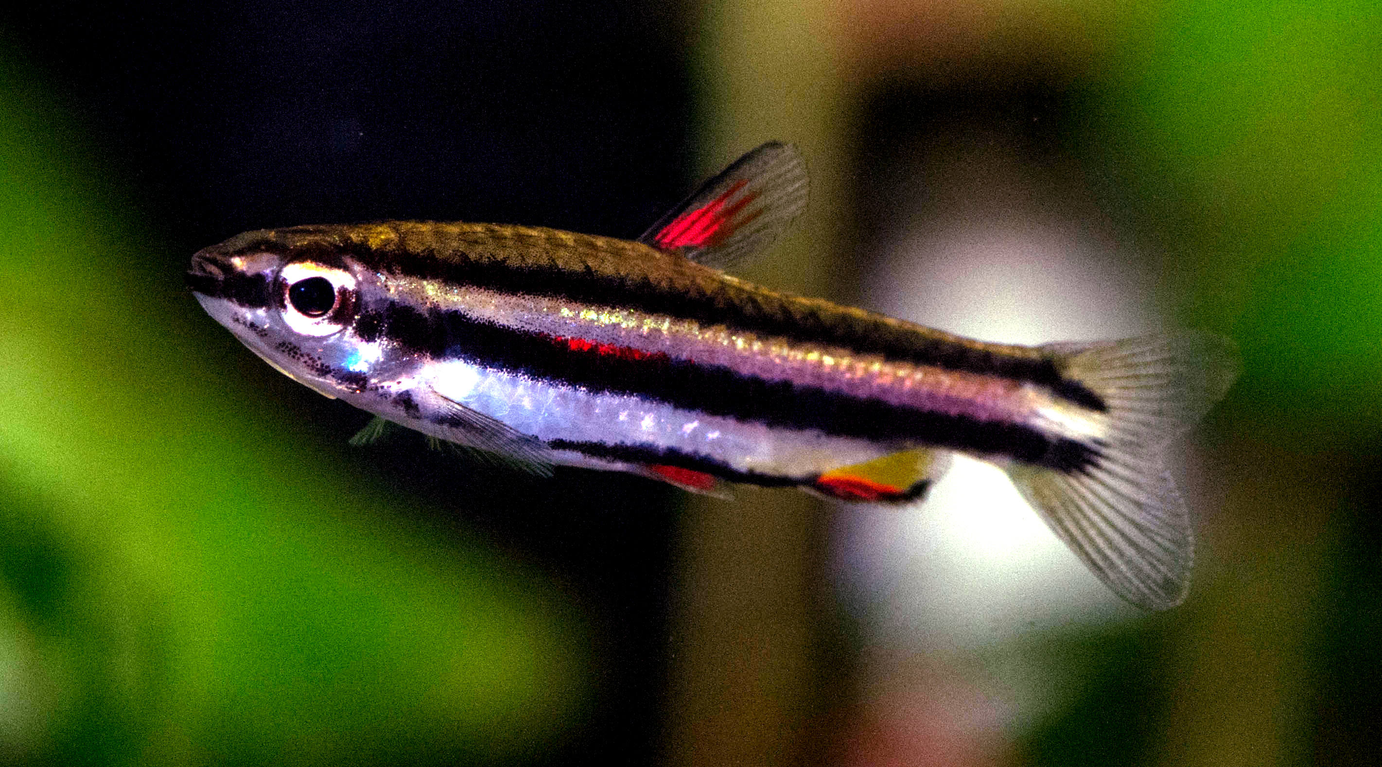 Zwergziersalmler, Nannostomus marginatus, adultes Männchen im Aquarium